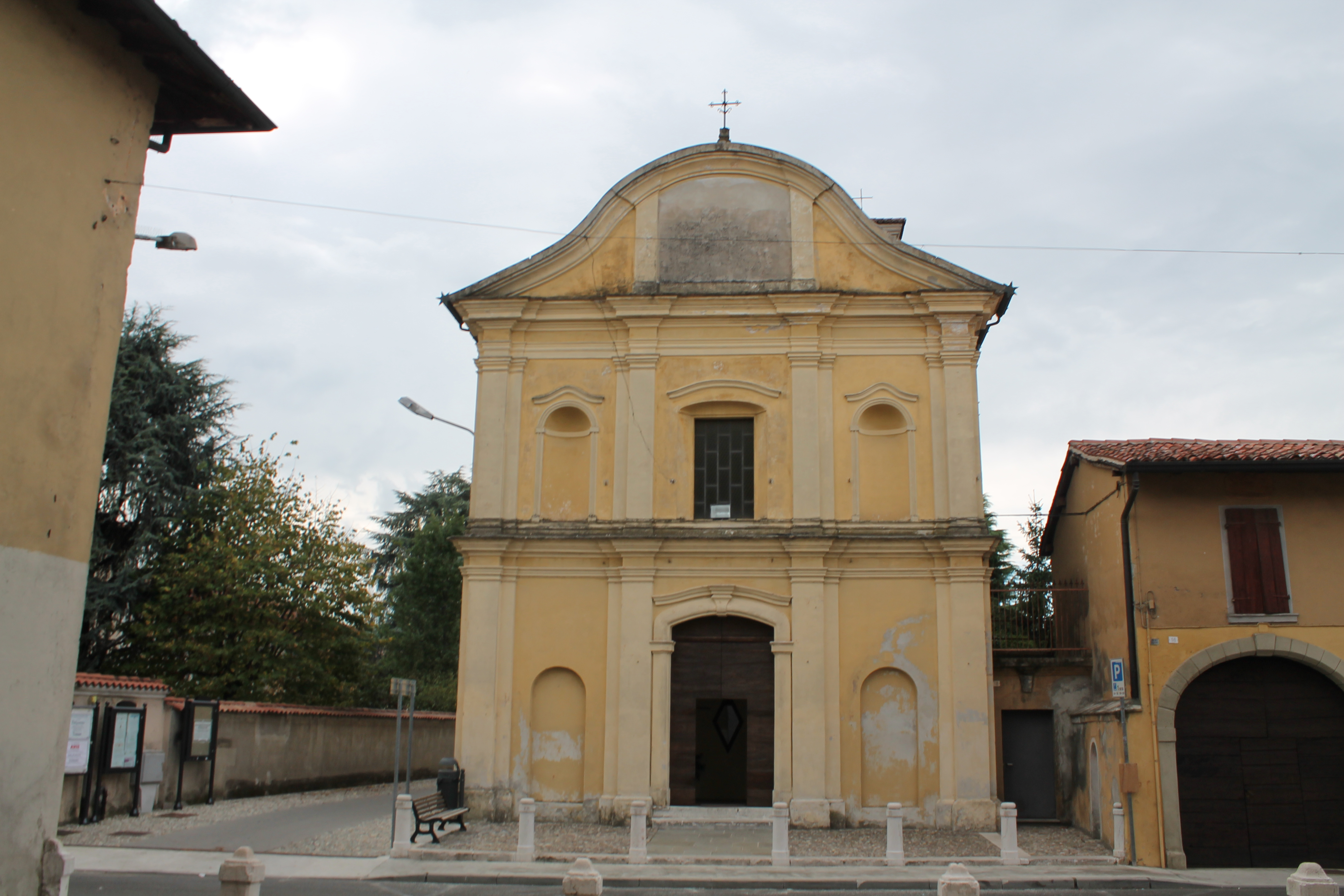 Foto della Chiesa di S. Alberto (Castelcovati, BS)